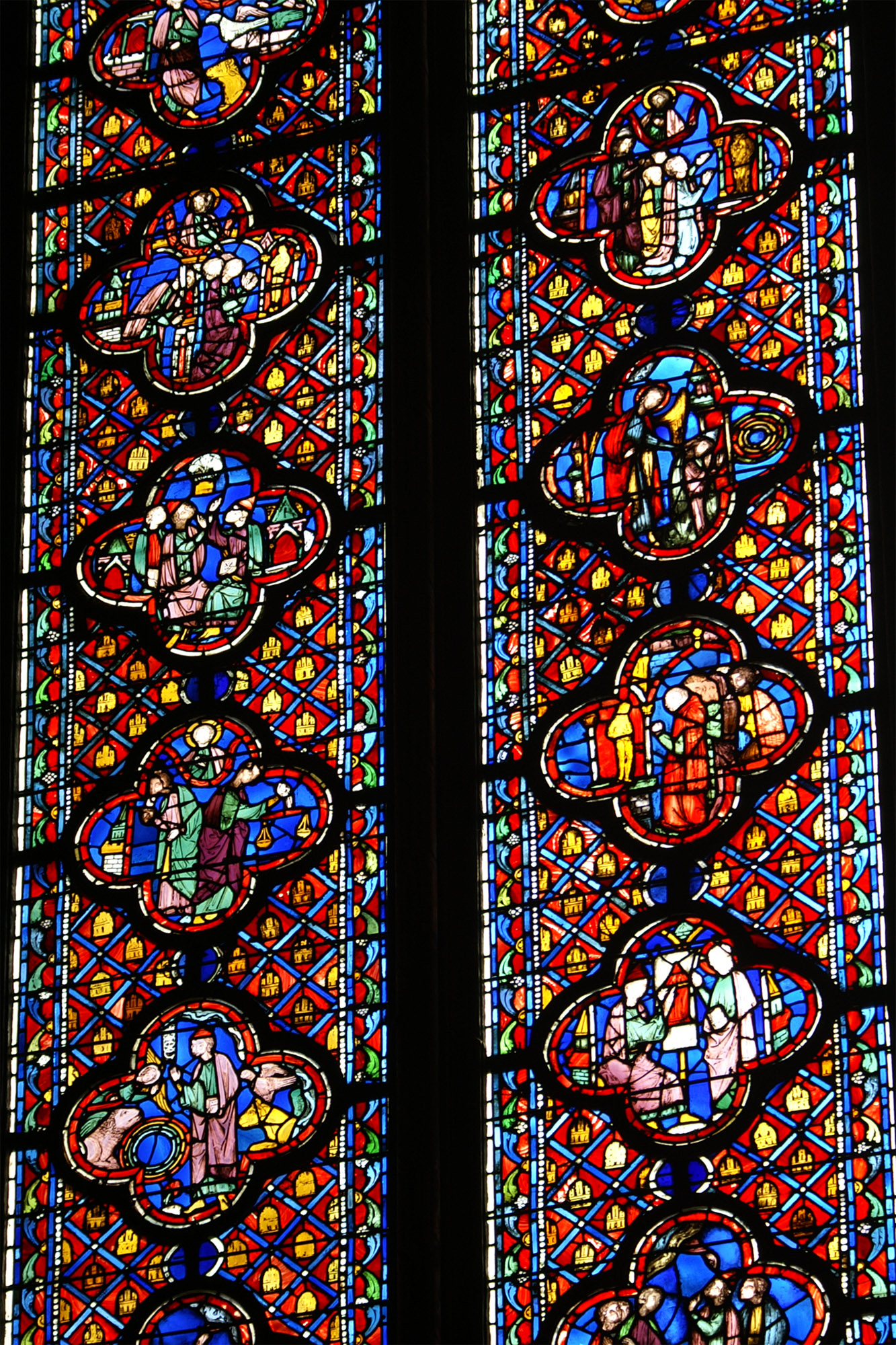 Vitrail du livre d'Ézéchiel, au sud de l'abside de la Sainte-Chapelle - Paris - France.